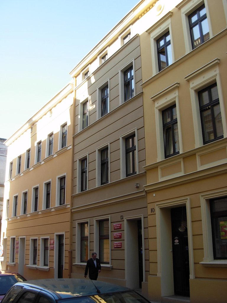 Kamienice Jezuicka 10-14 Bydgoszcz